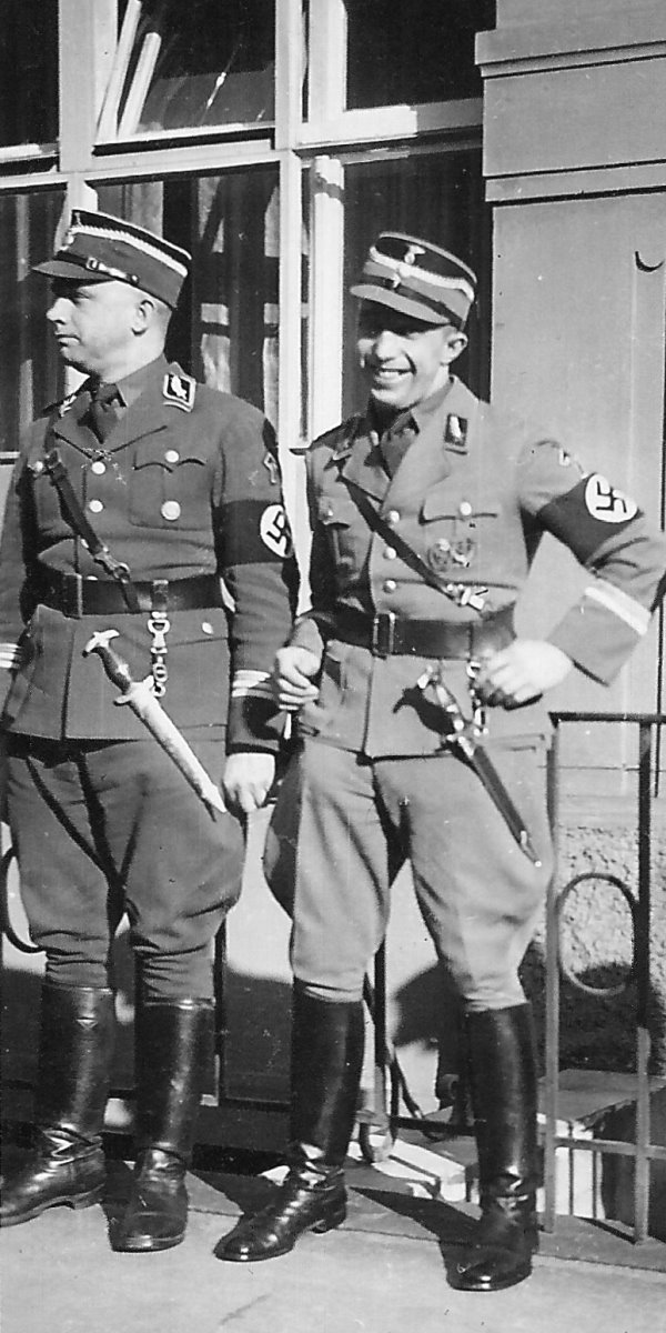 Oluf Christensen und Otto Wilkens am 10.3.1937 in München während des Ausbildungsprogramms zum SA-Brigadeführer